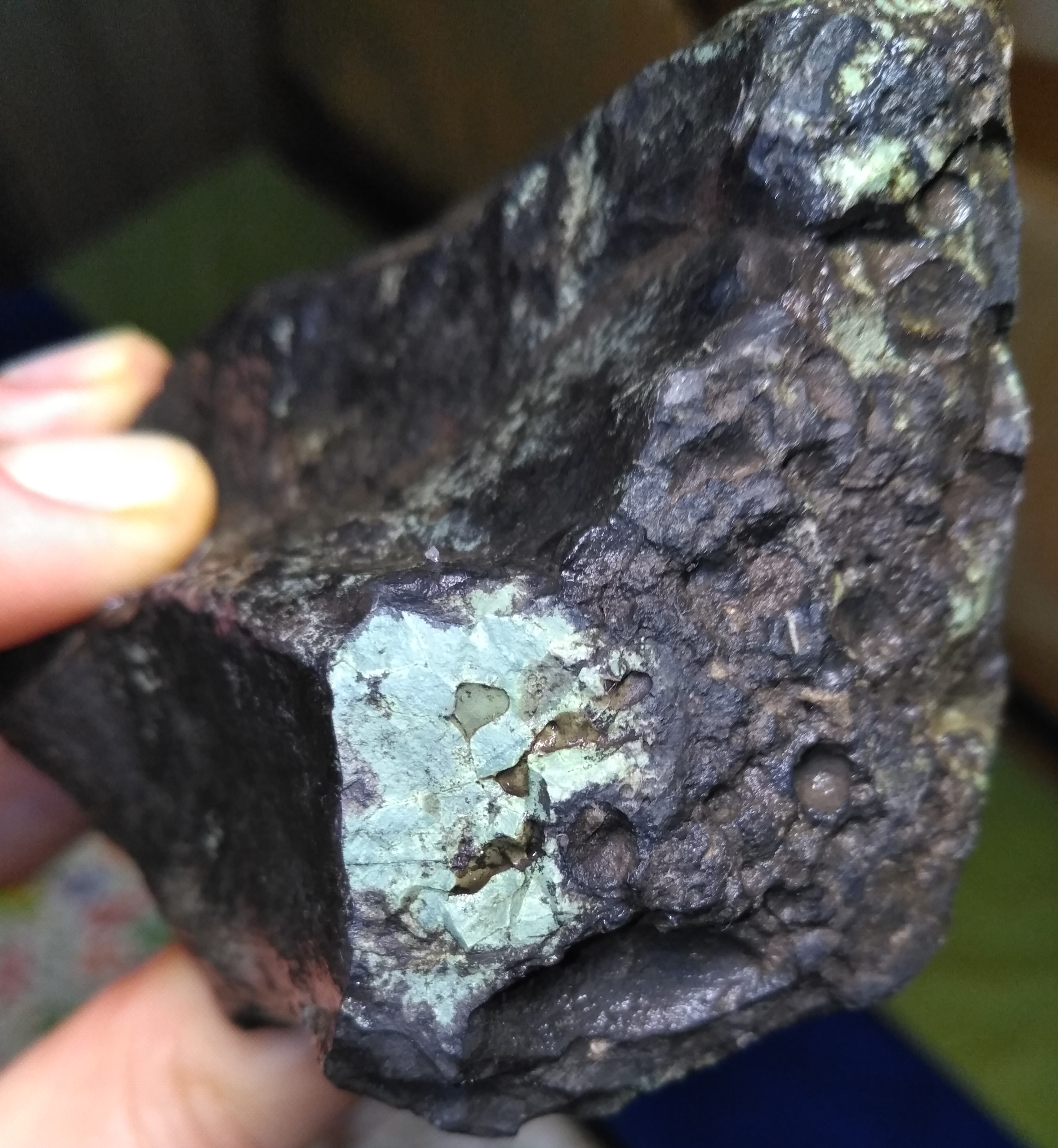 Шлак з виробництва марганцевих феросплавів НЗФ